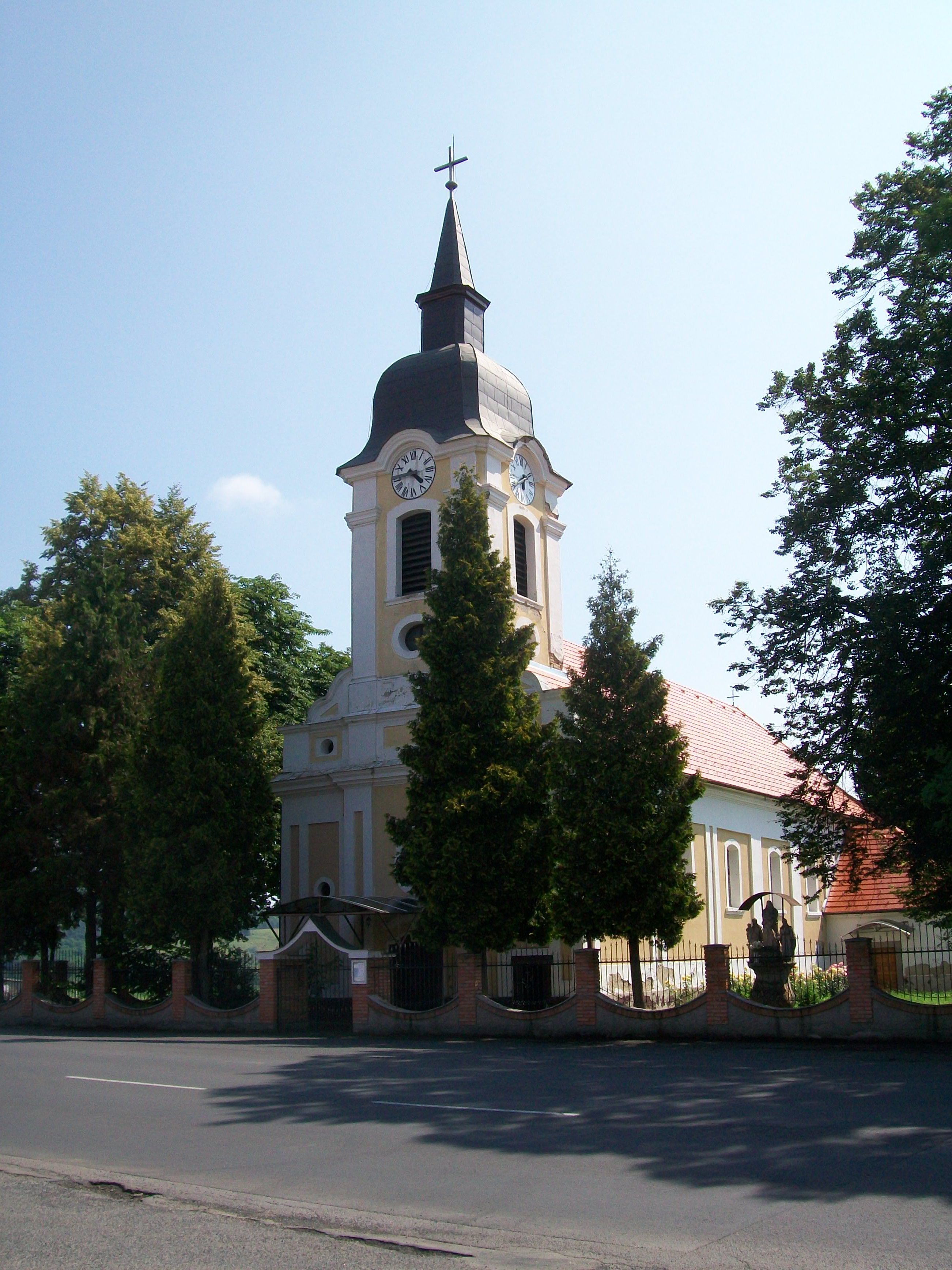 Rímskokatolícky Kostol sv. Štefana kráľa v Biskupiciach (okr. Lučenec)